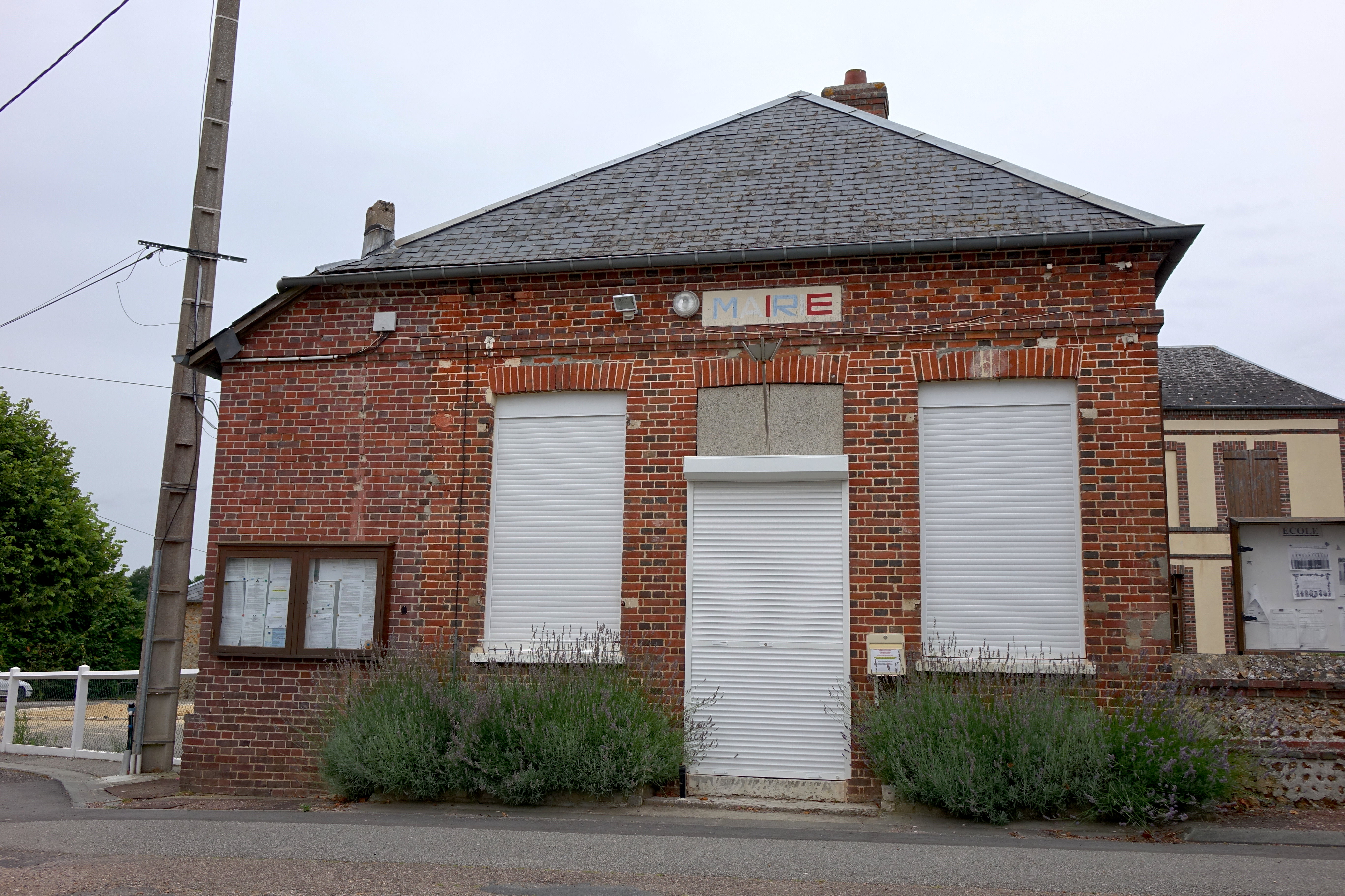 Mairie de Nagel-Séez-Mesnil, Eure, France